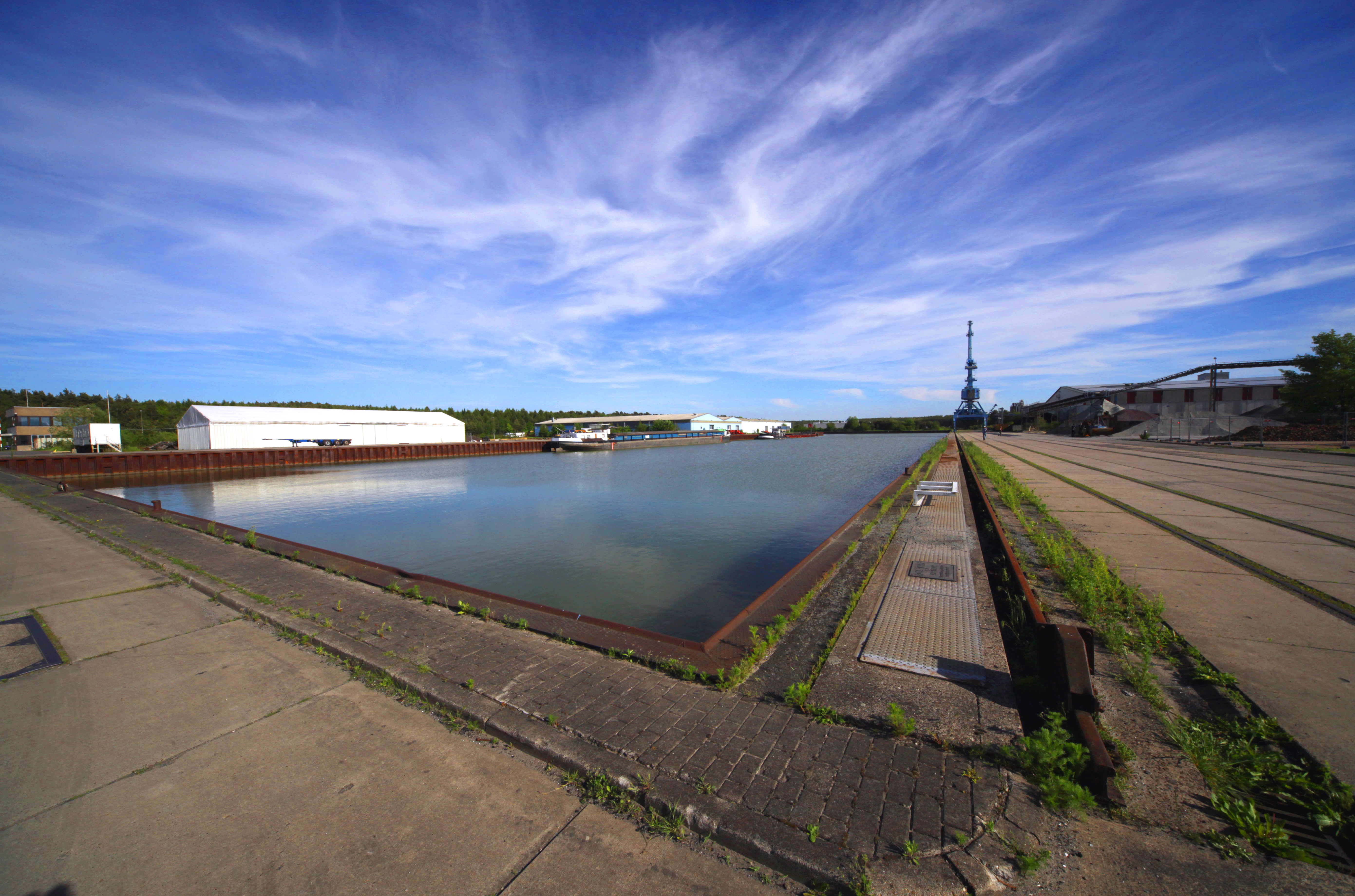 Hafen Lüneburg